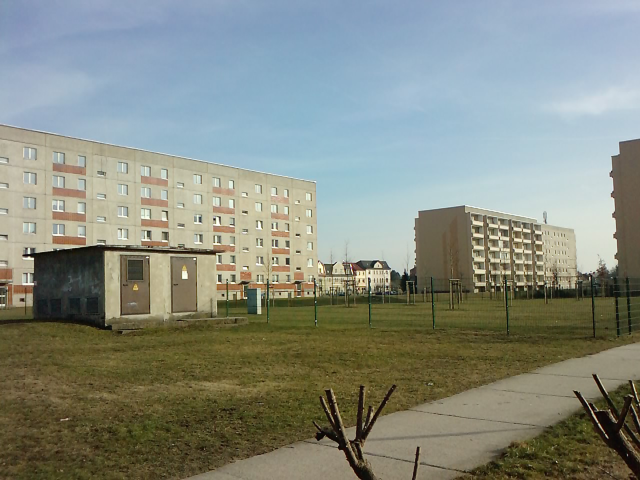 Die Wohnblocks am Tierpark